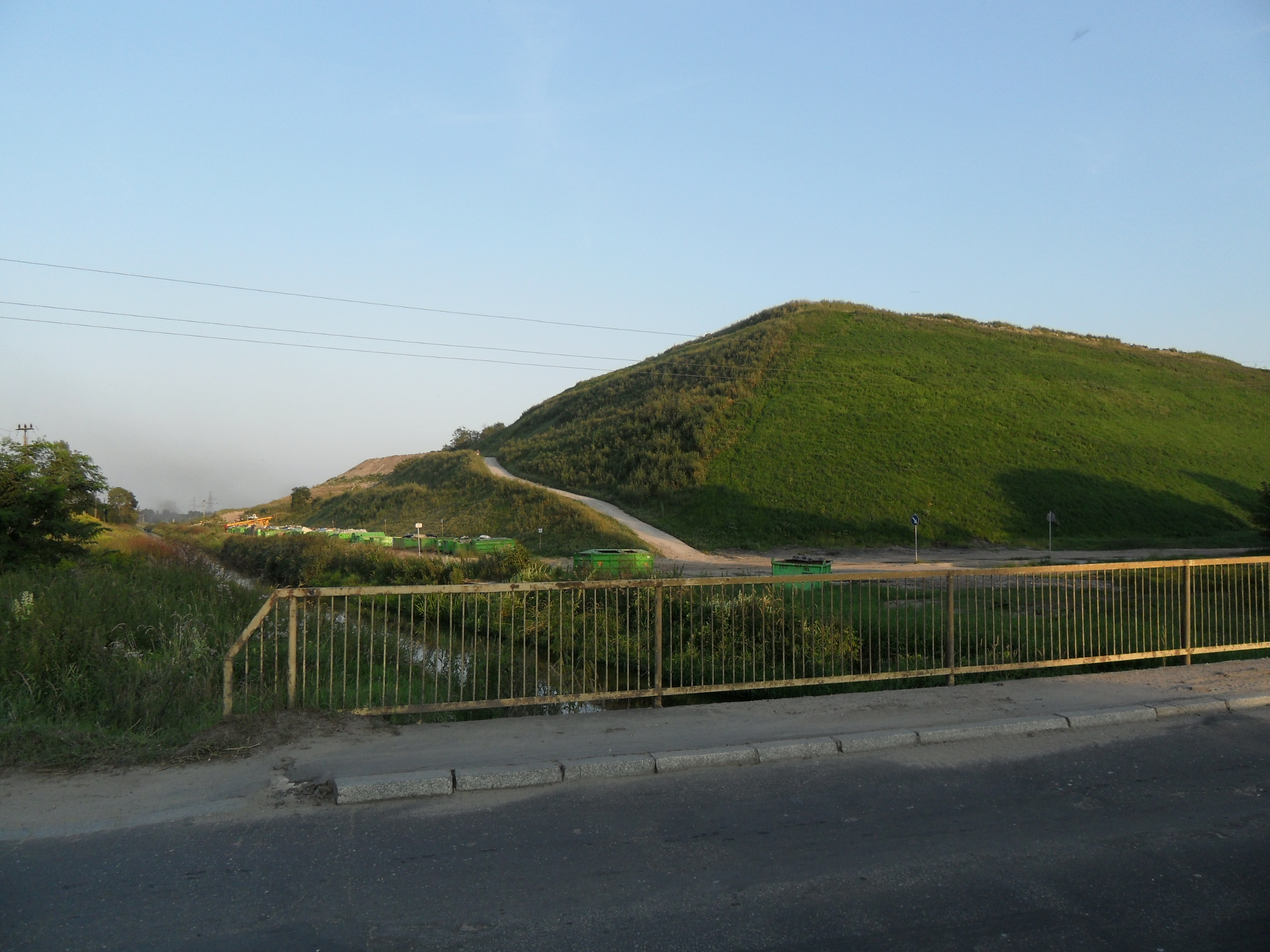 Zamknięte wysypisko śmieci w Pruszkowie przy ul. Przejazdowej, z mostku na Utracie